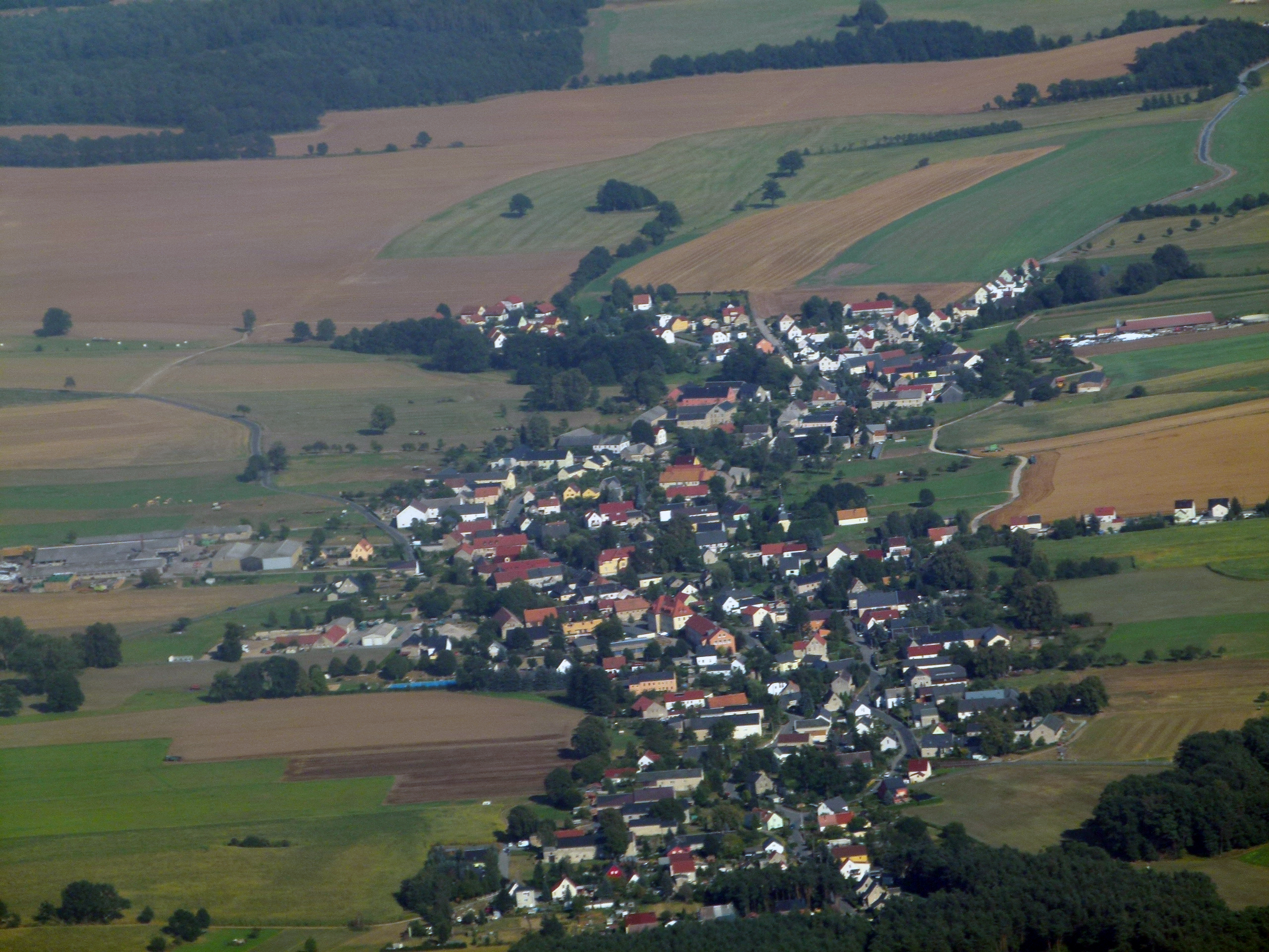 Luftbild von Großnaundorf